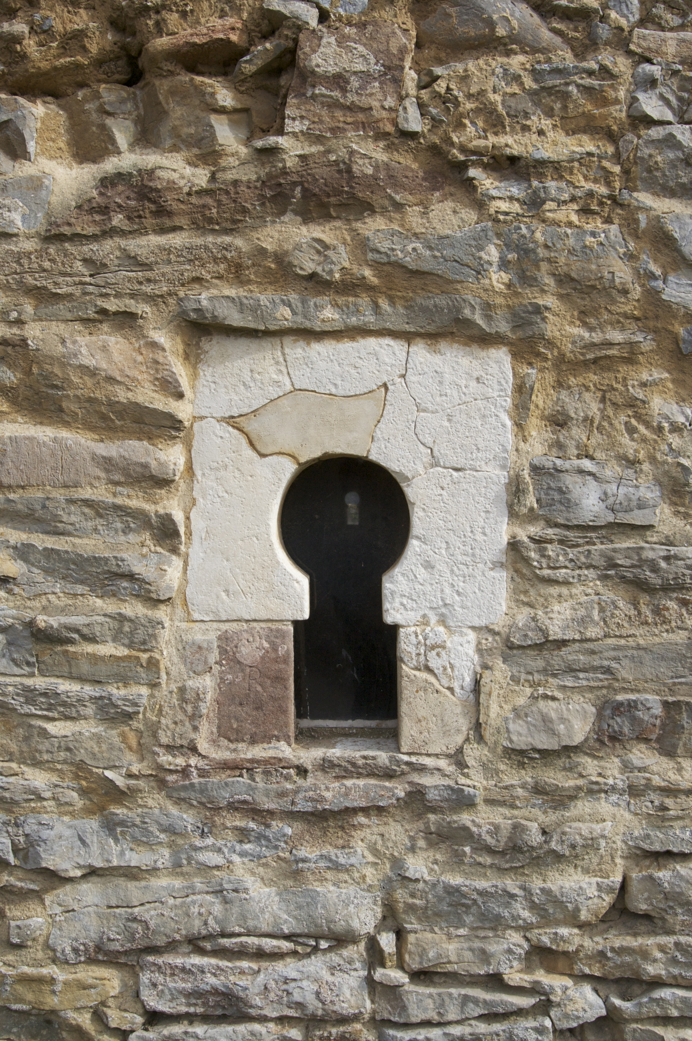 Ventana prerrománica de arco de herradura situada en el templo de Santianes de Pravia del siglo VIII